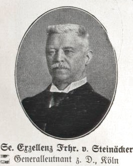 Heinrich von Steinaecker (1850-1926) deutscher Generalleutnant, Preussischer Landtagsabgeordneter (Zentrum)